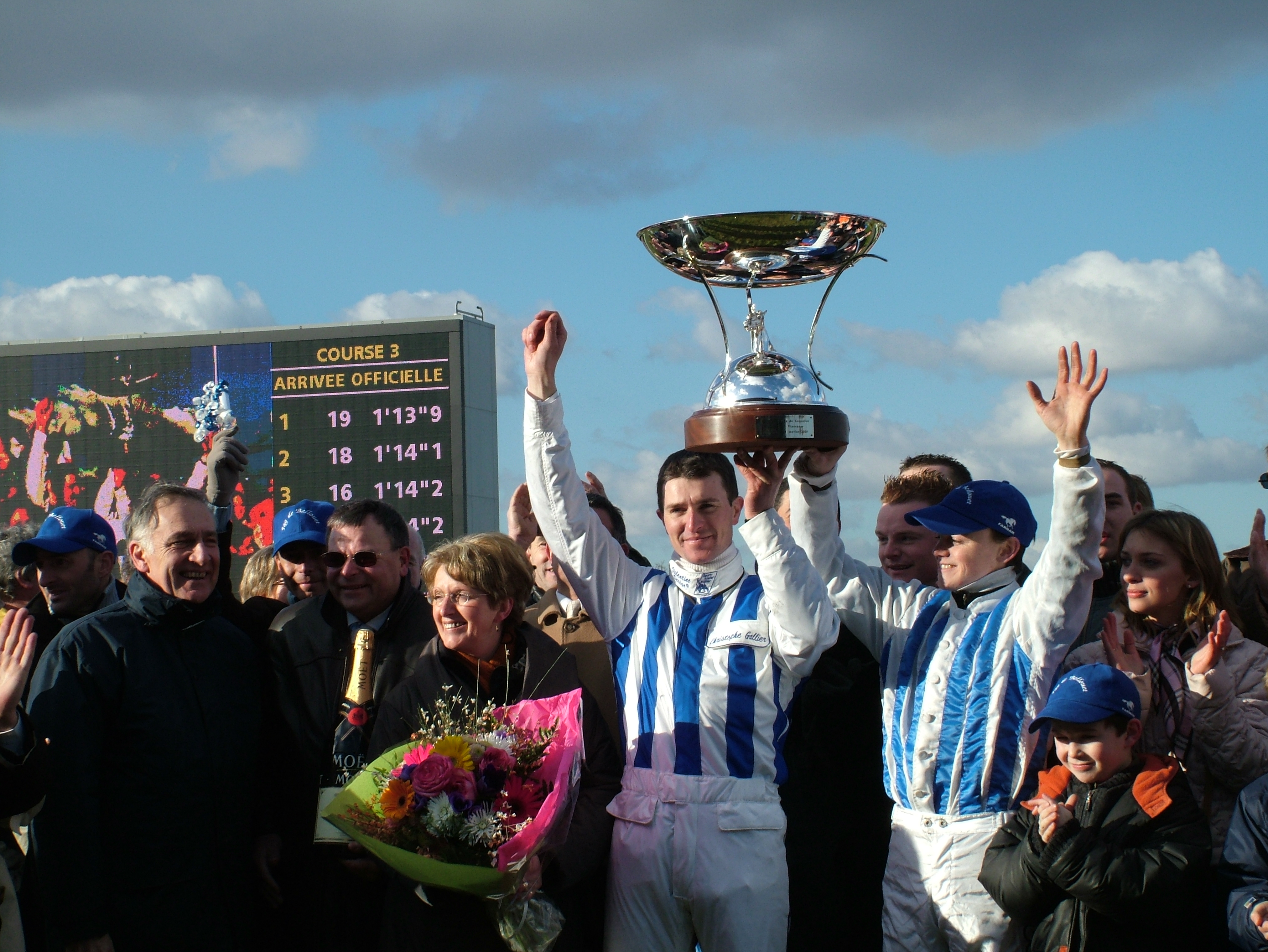 PRIX DU CORNULIER A VINCENNES